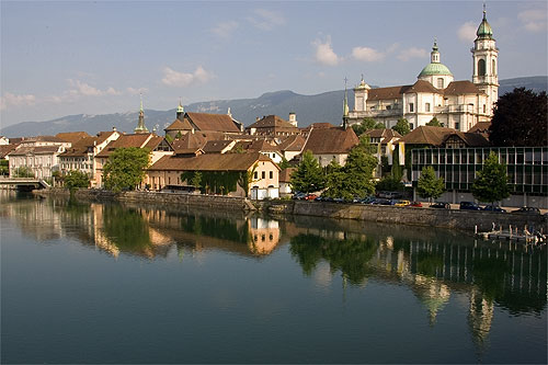 Solothurn: St.Ursen-Kathedrale